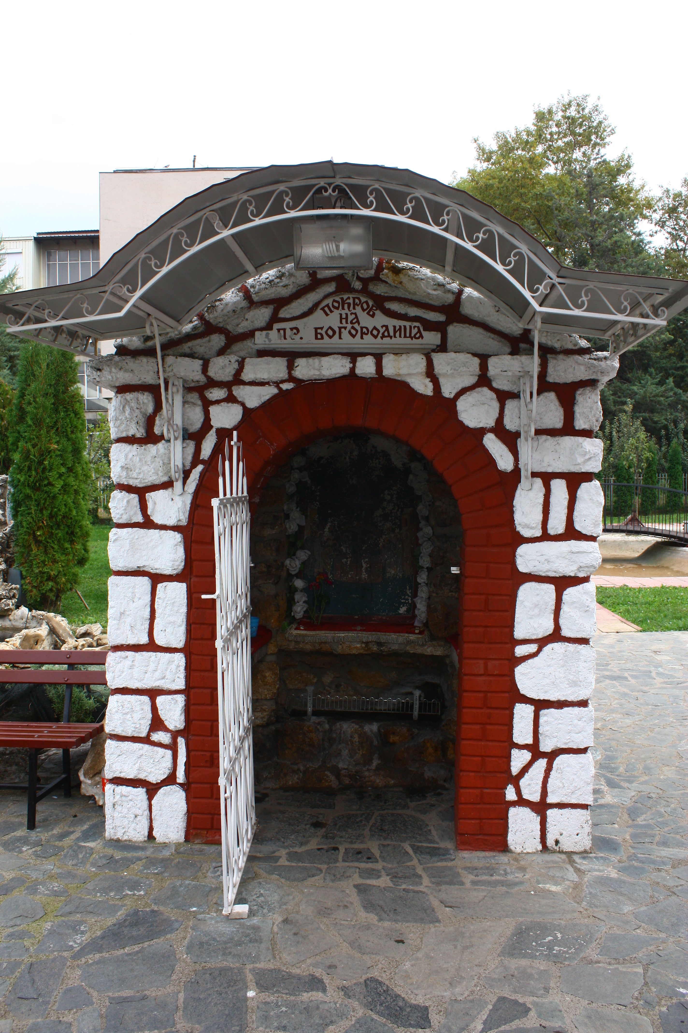 Црква Свети Арханѓел Михаил-Автокоманда-Скопје Ова е фотографија на споменик на културата во Македонија со типски код: А01This is a a photo of a cultural monument in North Macedonia with type id: А01